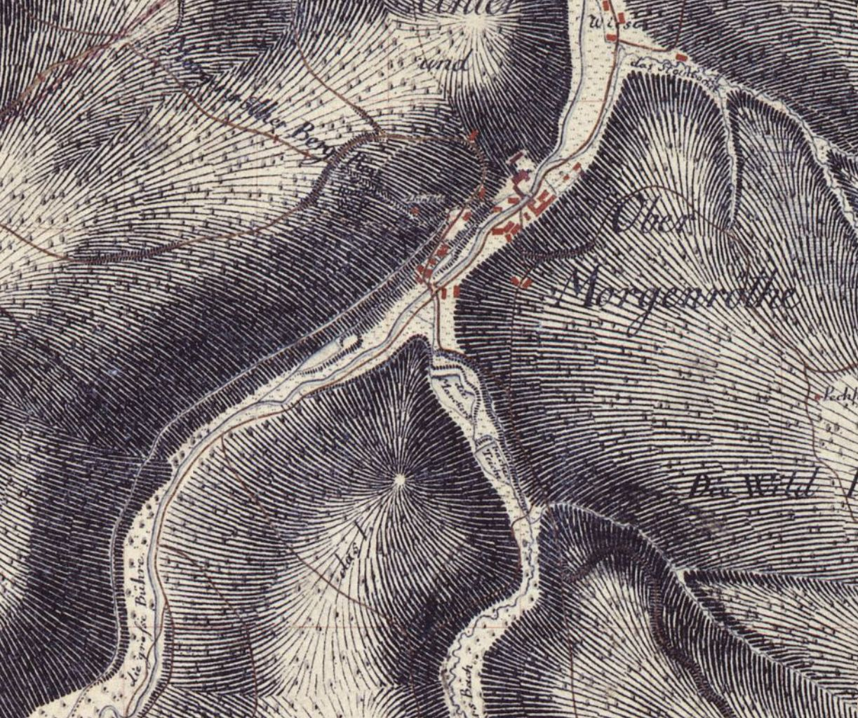 In Blatt 211 der Sächsischen Meilenblätter – Freiberger Exemplar -, Grundaufnahme im Jahr 1791, Nachträge bis zum Jahr 1876, ist der Fluss Große Pyra (mit der Bezeichnung „die Große Bühre“) und sein Tal mitten in den Wäldern südlich der Zwickauer Mulde dargestellt. Weiter sind in der Karte bezeichnet Die Ortschaft Morgenröthe“, hier bezeichnet mit Ober- und Unter-Morgenröthe. Link zum Kartenblatt